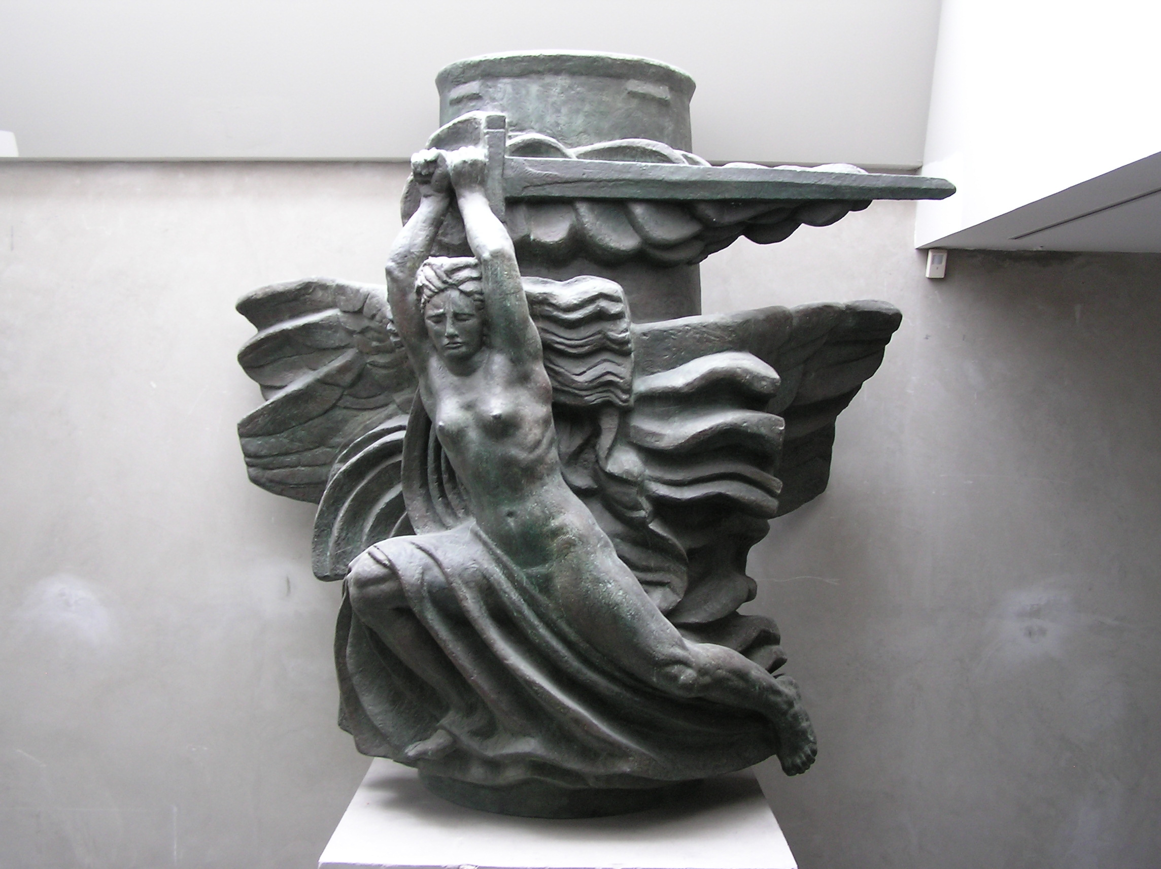 Le Monument à Mickiewicz : l'Epopée Polonaise au musée Bourdelle à Paris